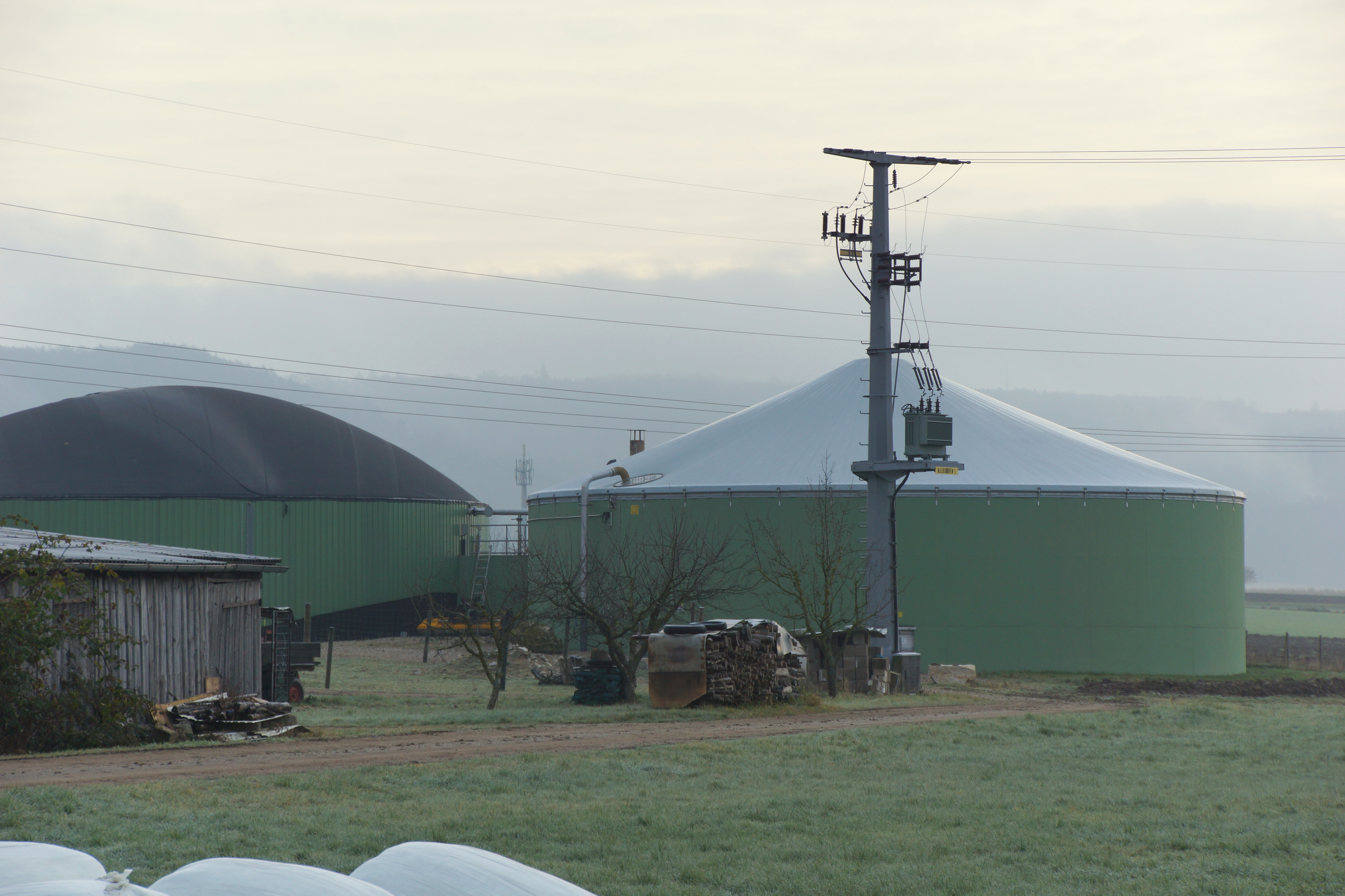 Allershofen bei Berngau in der Oberpfalz